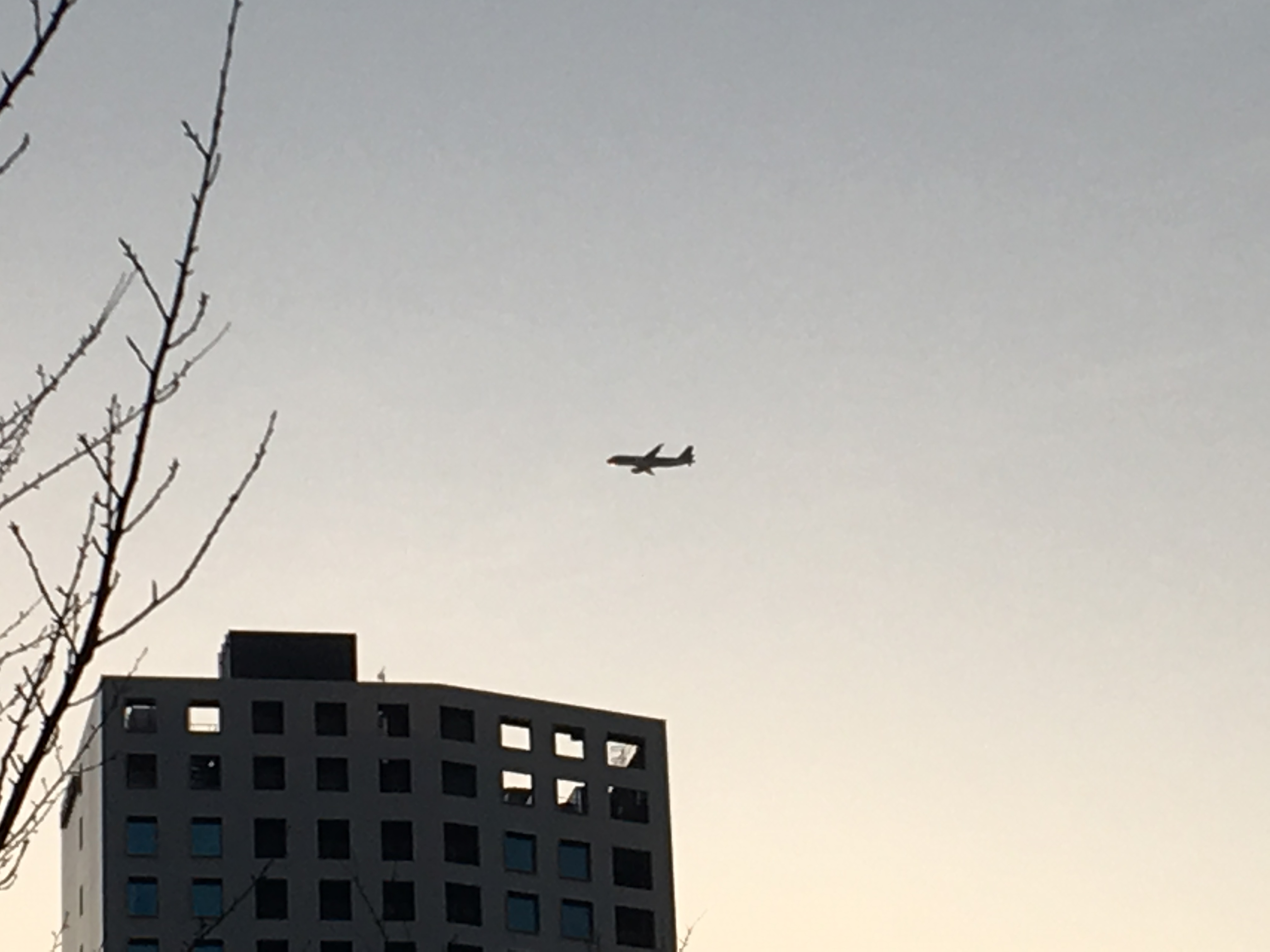 羽田空港(東京国際空港)への着陸ルートに際し、今までとは異なる都心上空を飛行するルートが選定された。この写真は2020年1月末から2020年3月末まで行われた羽田空港新着陸ルートの試験飛行のため東京都心上空を低空飛行する様子を東京都港区赤坂から撮影したものである。